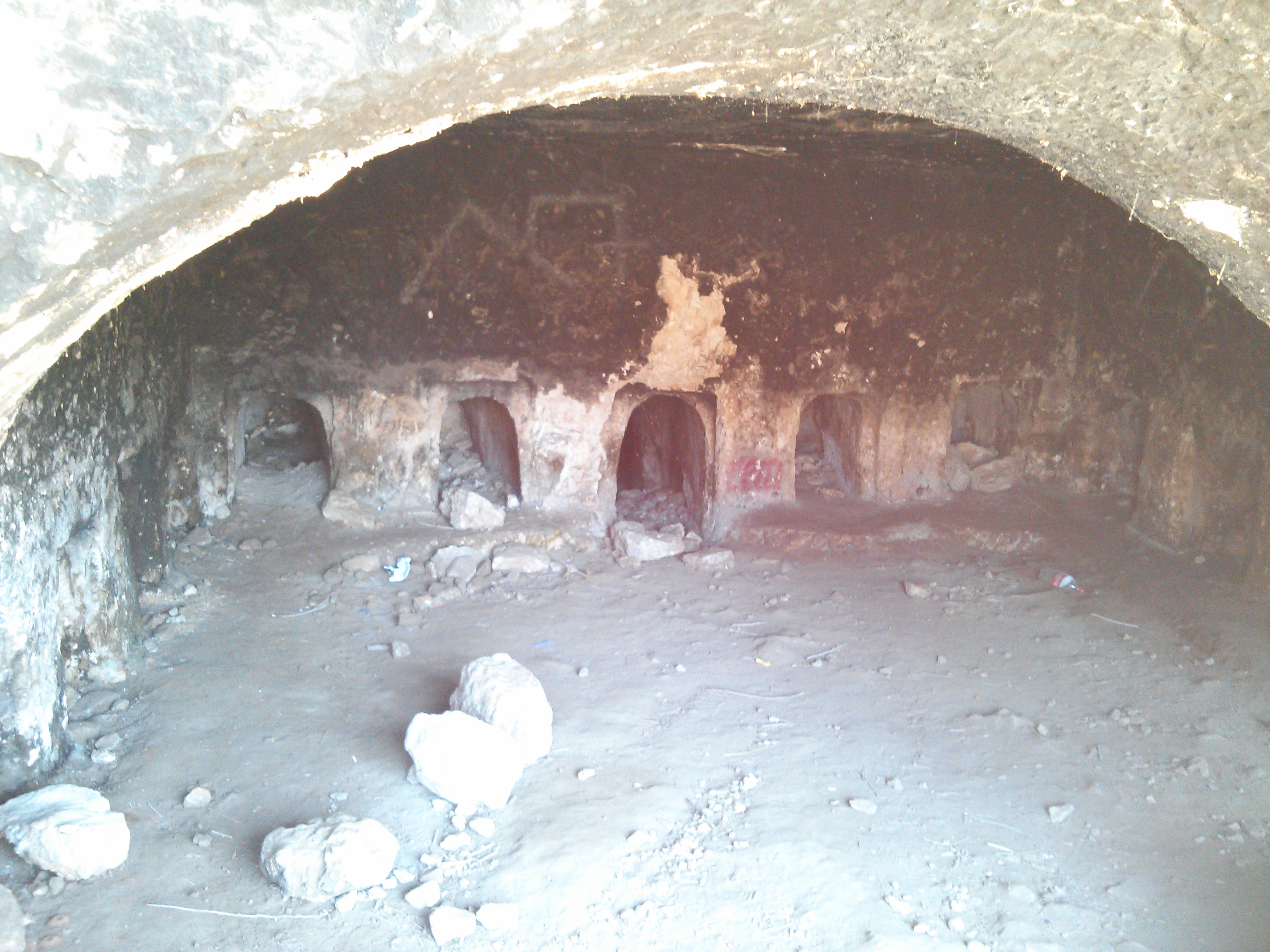 מערכת קבורה מפוארת מתקופת בית שני.